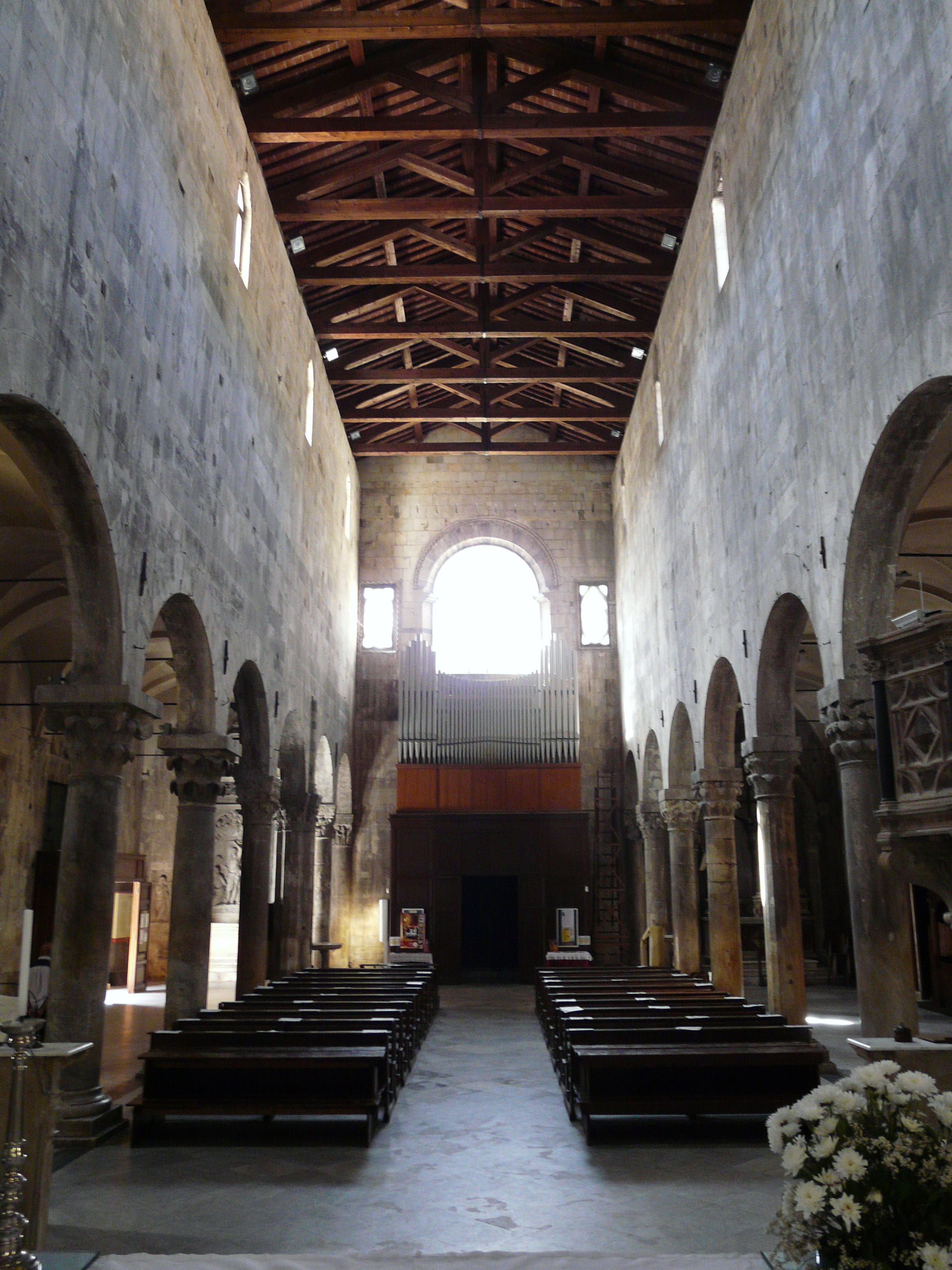 Navata centrale della cattedrale di Carrara, Toscana, Italia